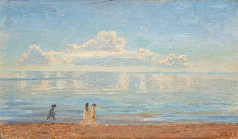 Spaziergänger am Strand von Skagen. Öl auf Leinwand, 30,5 x 48,5 cm, rechts unten monogrammiert und datiert LT 22, auf dem Keilrahmen bezeichnet Skagen.